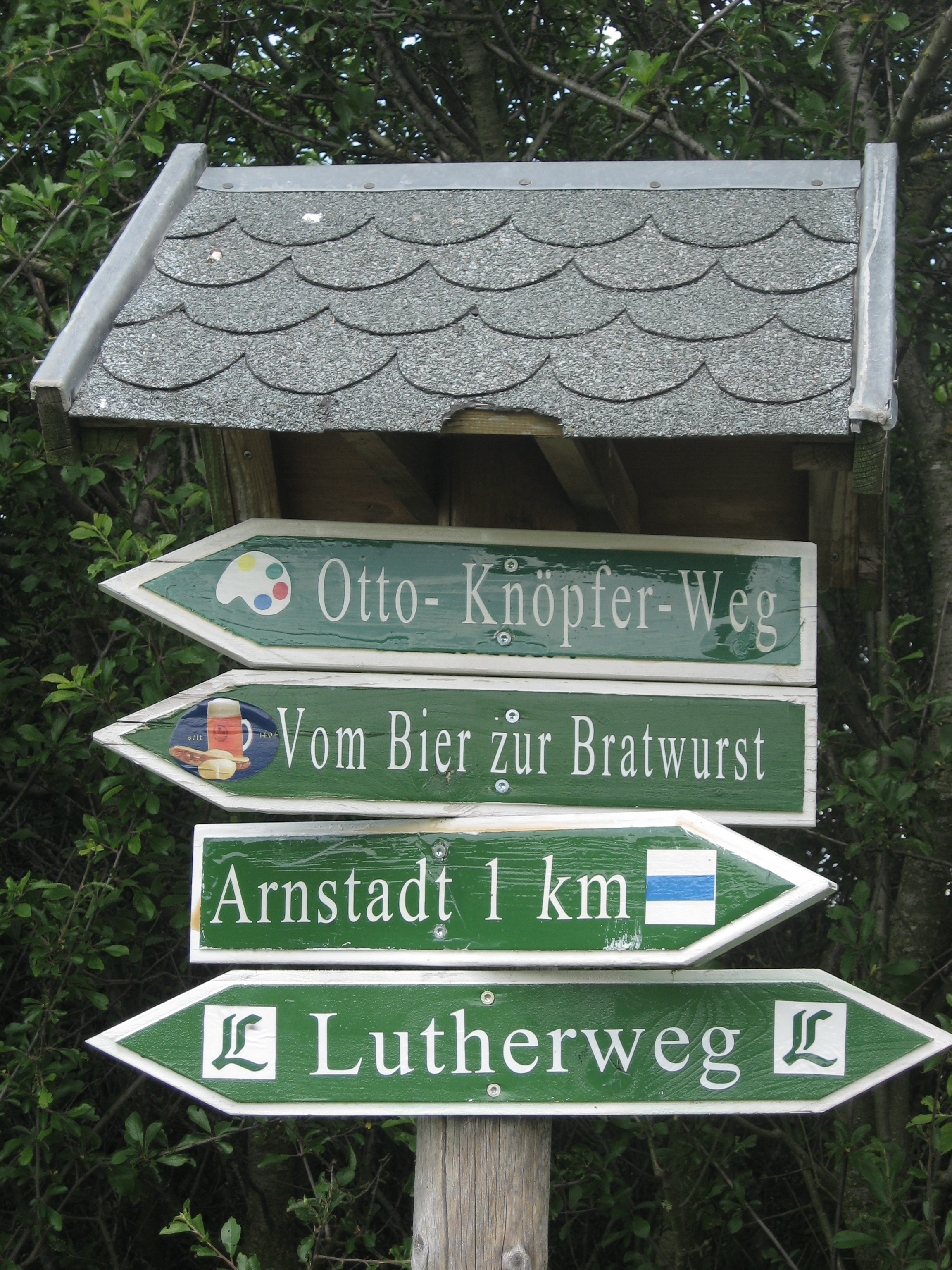 Erlebniswanderweg in Arnstadt